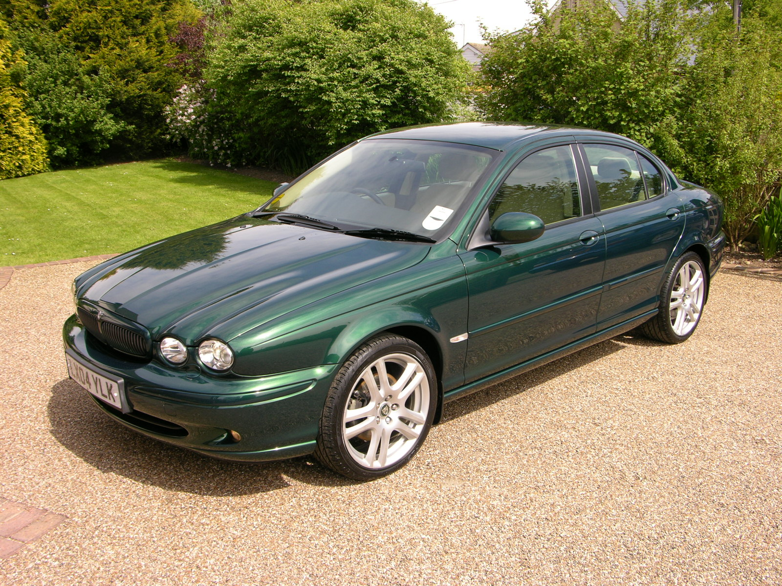 Jaguar XKR